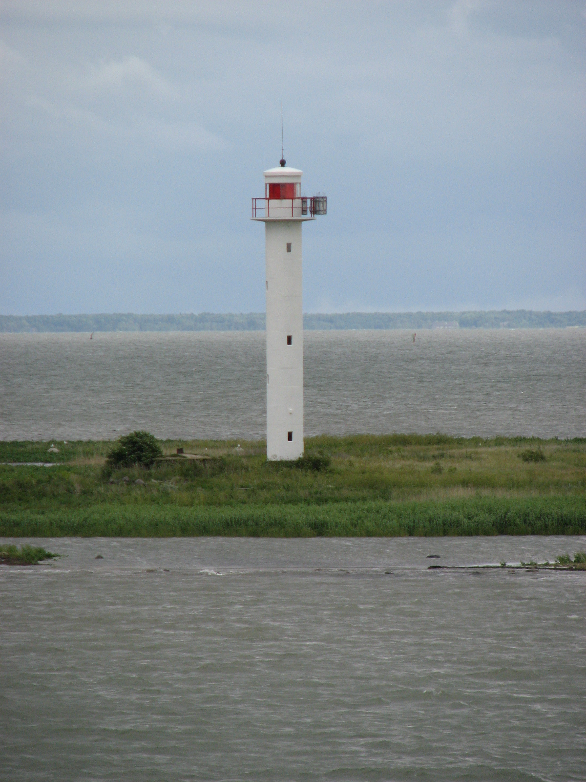 Rukkirahu island, Estonia